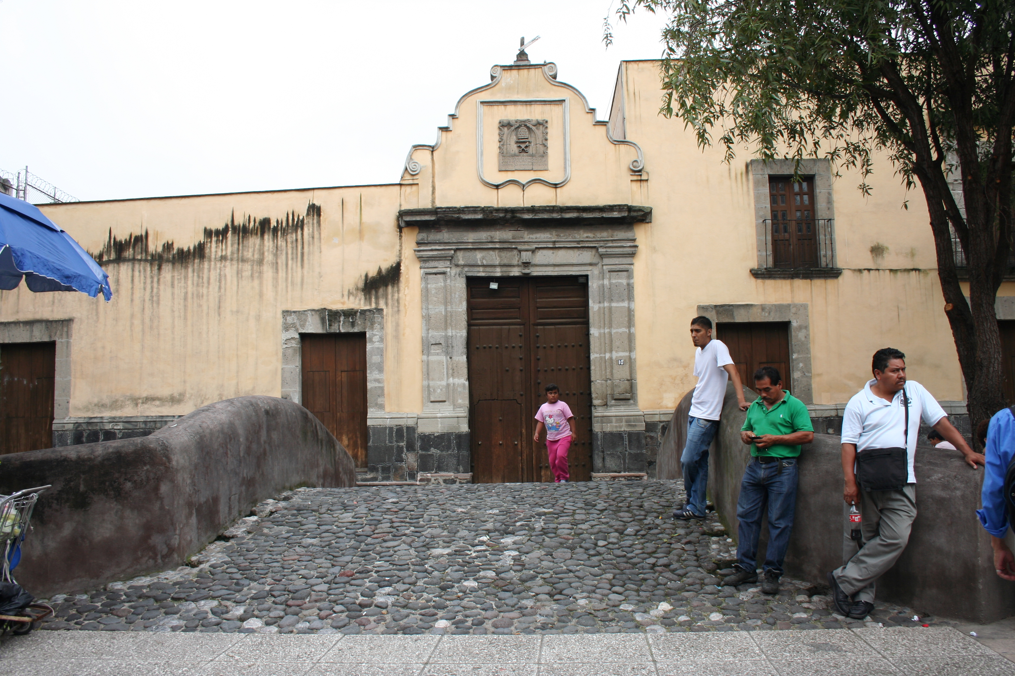 Edificio de la Alhóndiga y puente del Canal de Roldán